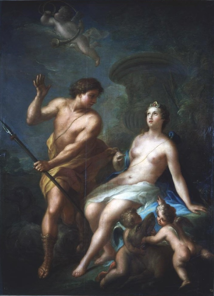 La obra representa a la diosa Venus junto a Adonis.